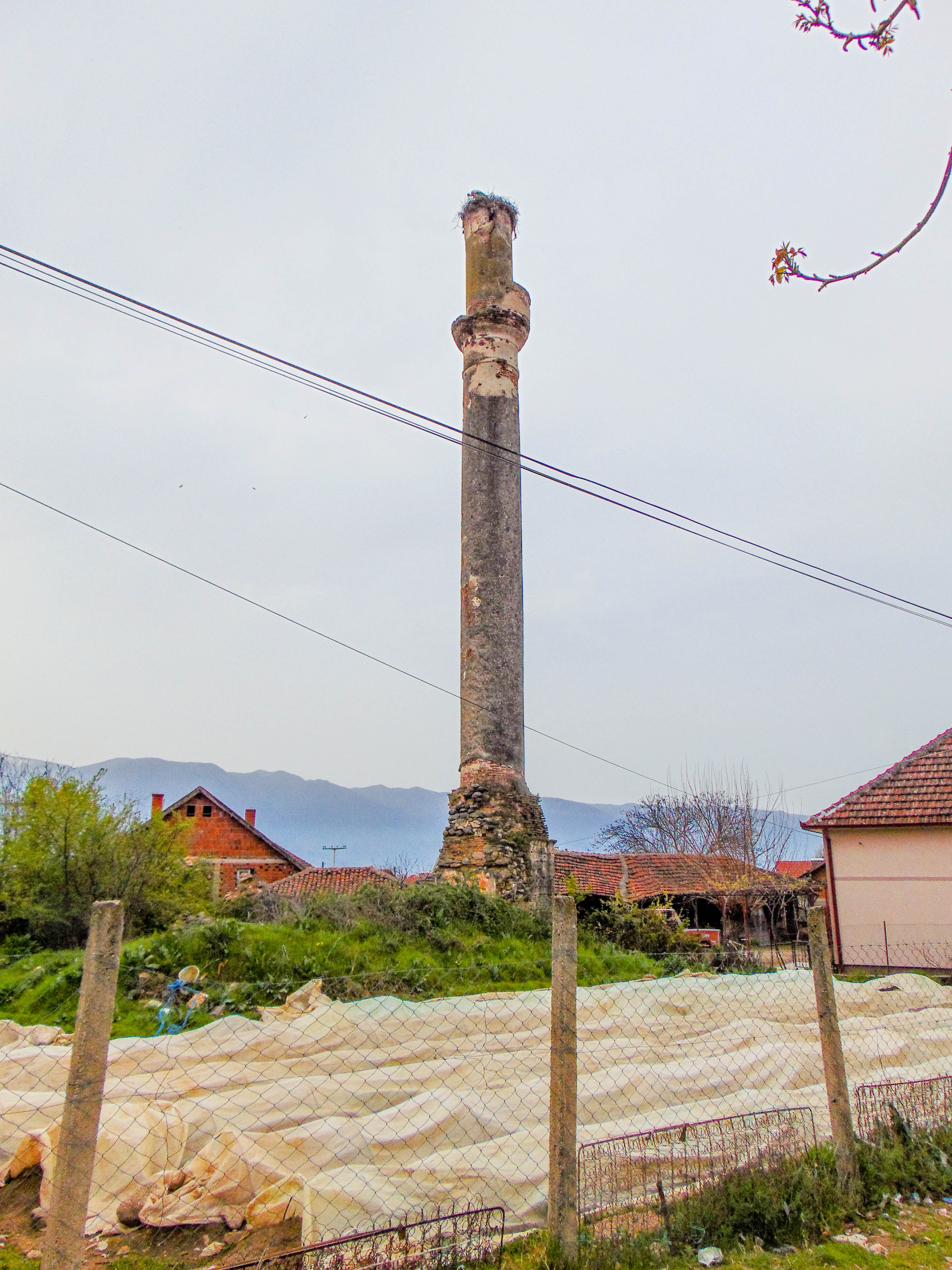 Минаре во Сушица